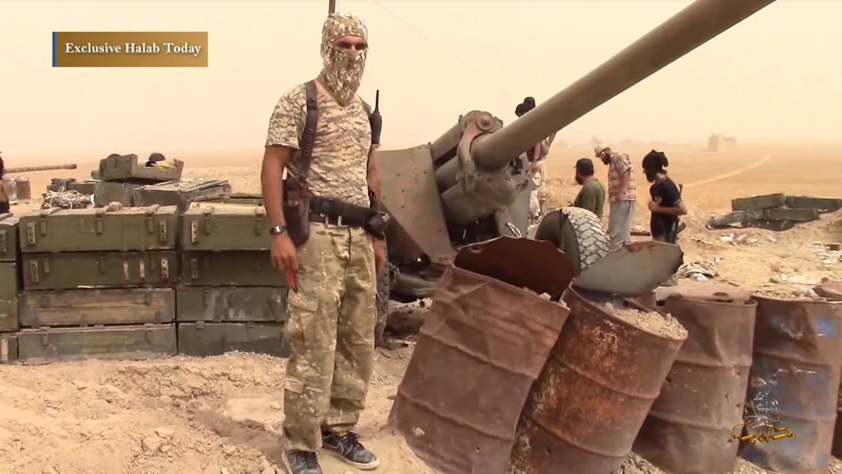 La base aérienne d'Abou Douhour le 11 septembre 2015, après sa prise par le Front al-Nosra, lors de la guerre civile syrienne.